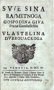 Cover des Buches "Suze sina razmetnoga"